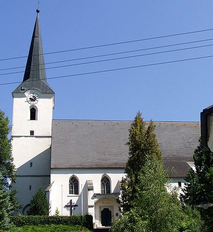 Pfarr- und Wallfahrtskirche Maria Rast, Steinerkirchen am Innbach, Gemeinde: Kematen am Innbach